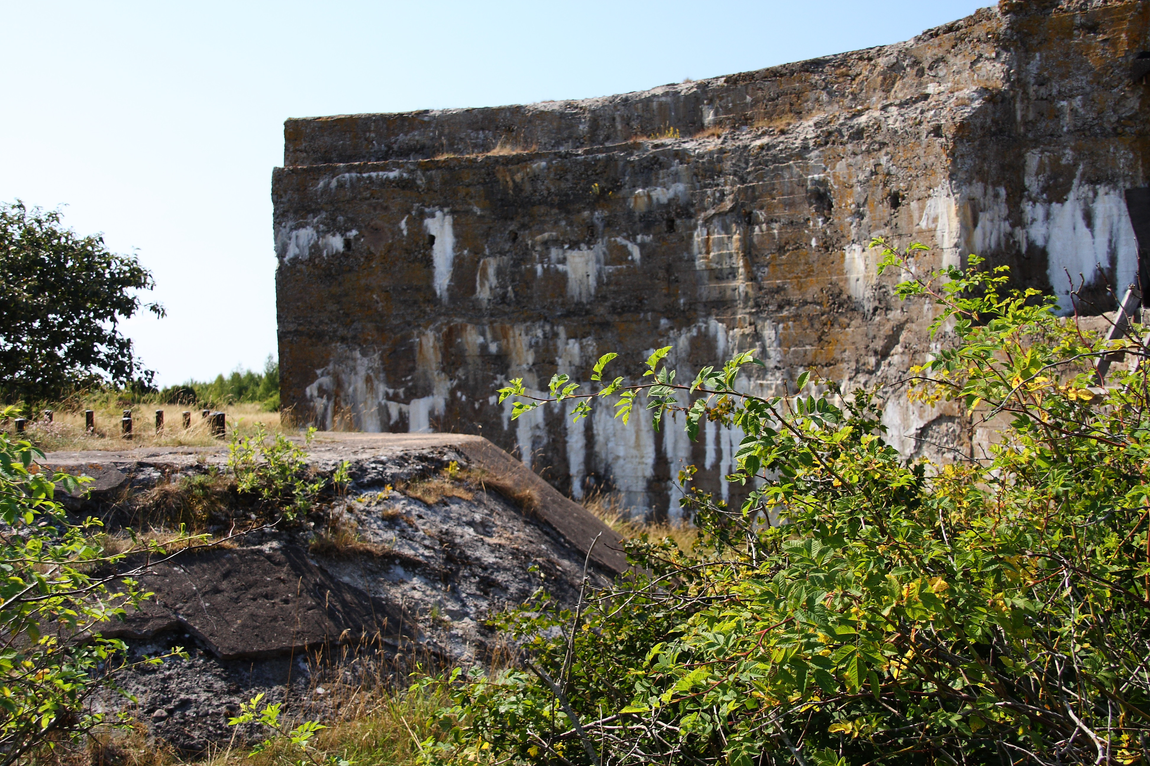 Остатки укреплений батареи №43 на мысе Церель